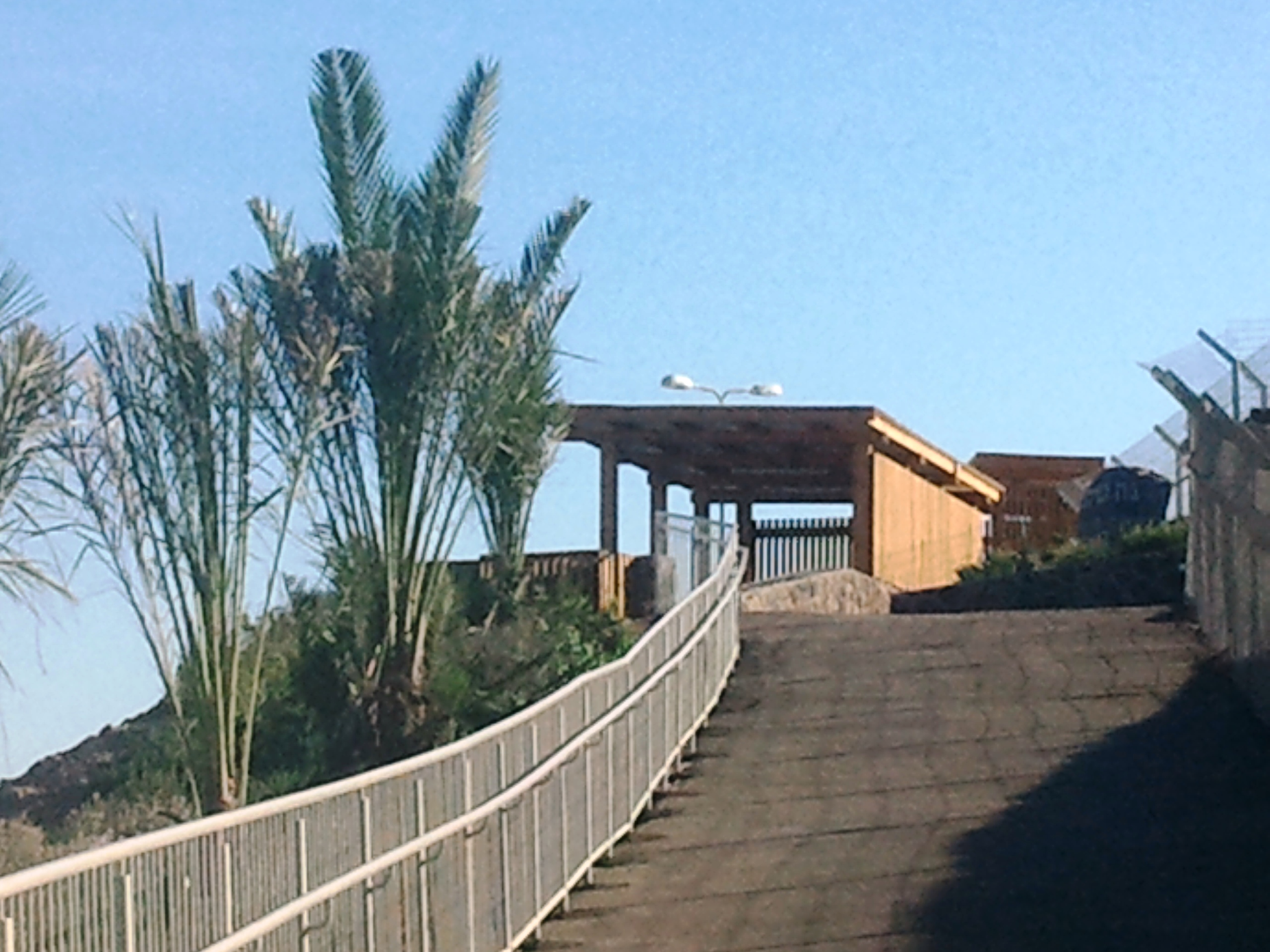 מצפה נח הוא נקודת תצפית הקרויה על שמו של "נח כנרתי" ונמצאת על רמת סירין. ליד נקודת התצפית מאגר מים הקרוי גם הוא על שמו של נח כנרתי